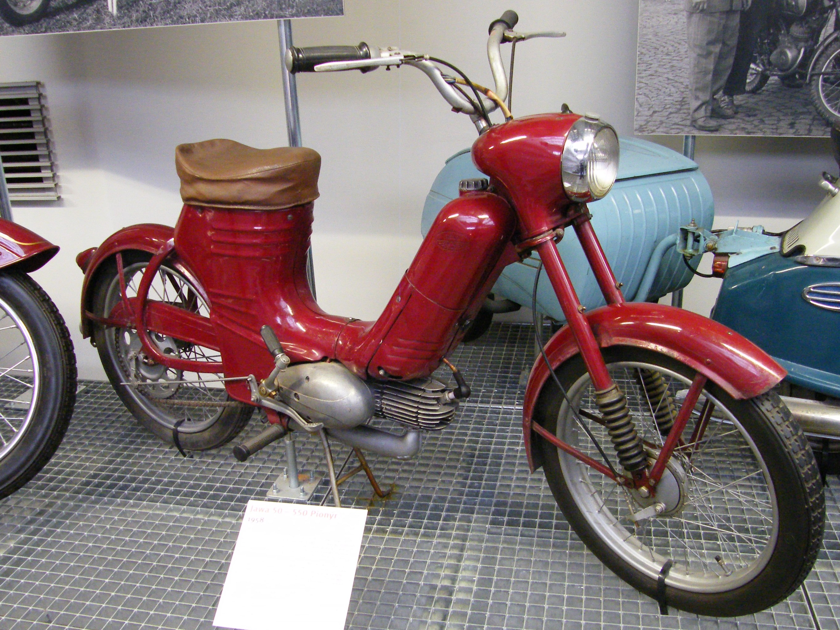 Jawa 50/550 Pařez v NTM Praha